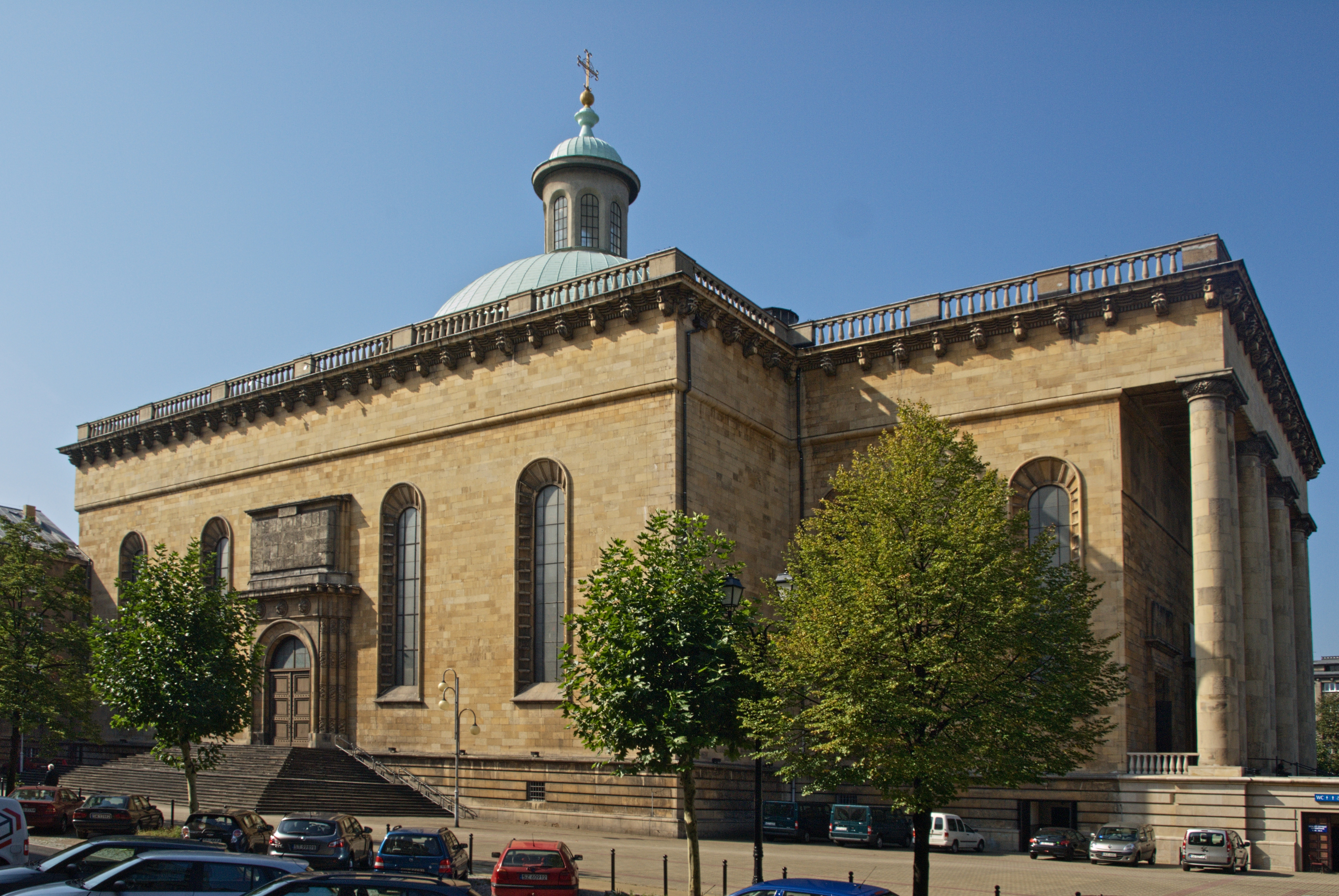 Archikatedra Chrystusa Króla zbudowana w latach 1927−1955 w stylu klasycyzującym według projektu architektów Z. Gawlika i F. Mączyńskiego (zabytek nr A/1658/97)